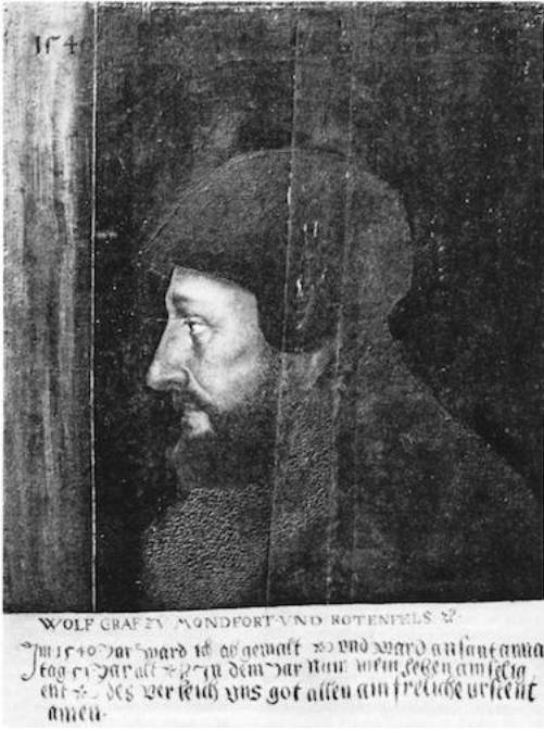 Wolfgang I. von Montfort-Rothenfels, Ölgemälde von 1540 auf der Churburg im Nordwesten Südtirols.